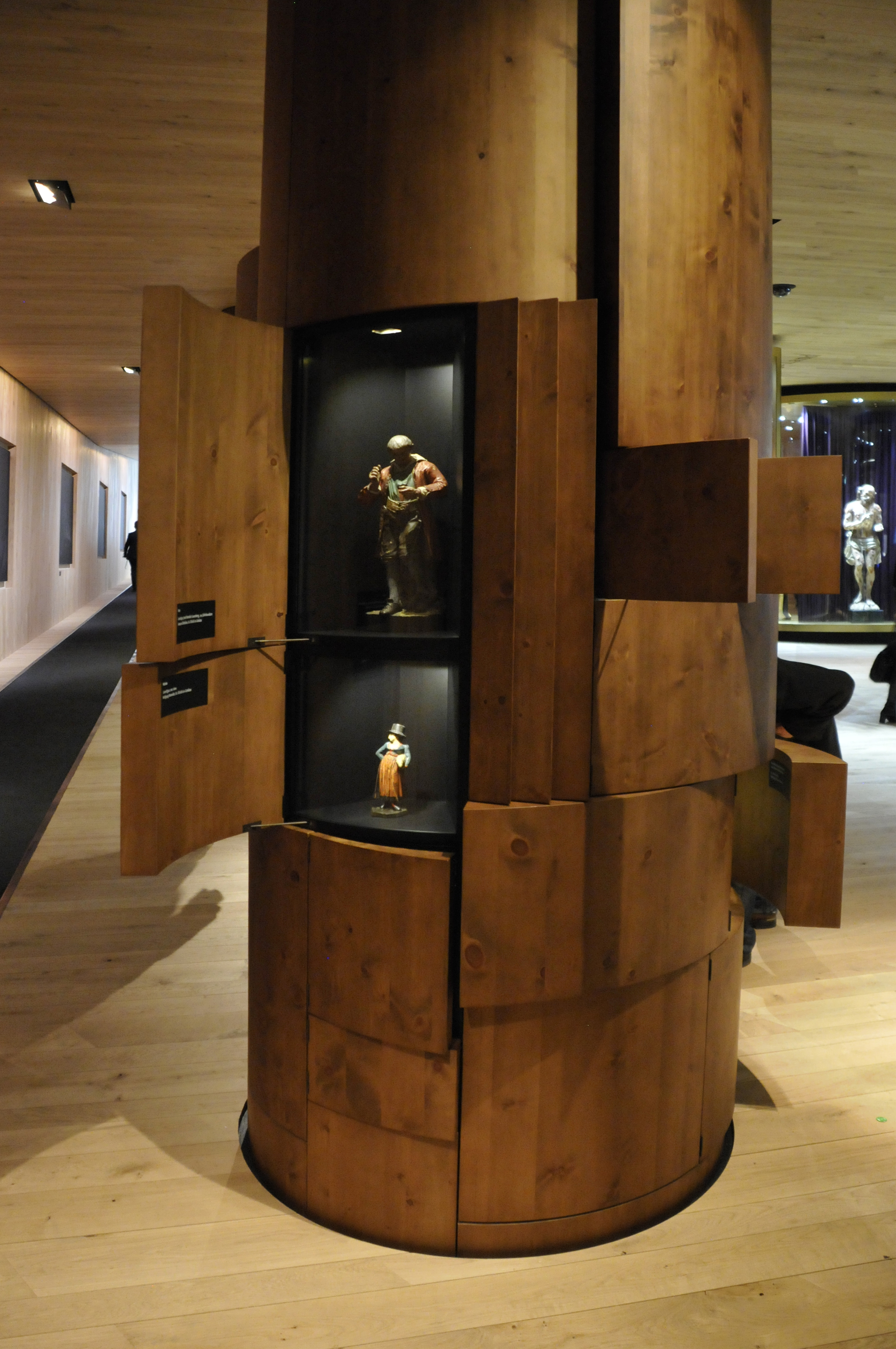 Das Museum am Bergisel - Das Tirol Panorama Exponate: Grödner Holzplastiken 19. Jahrhundert